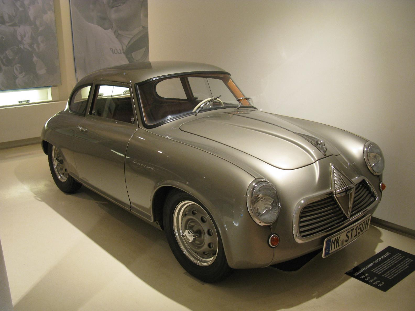 Protoyp Museum Hamburg